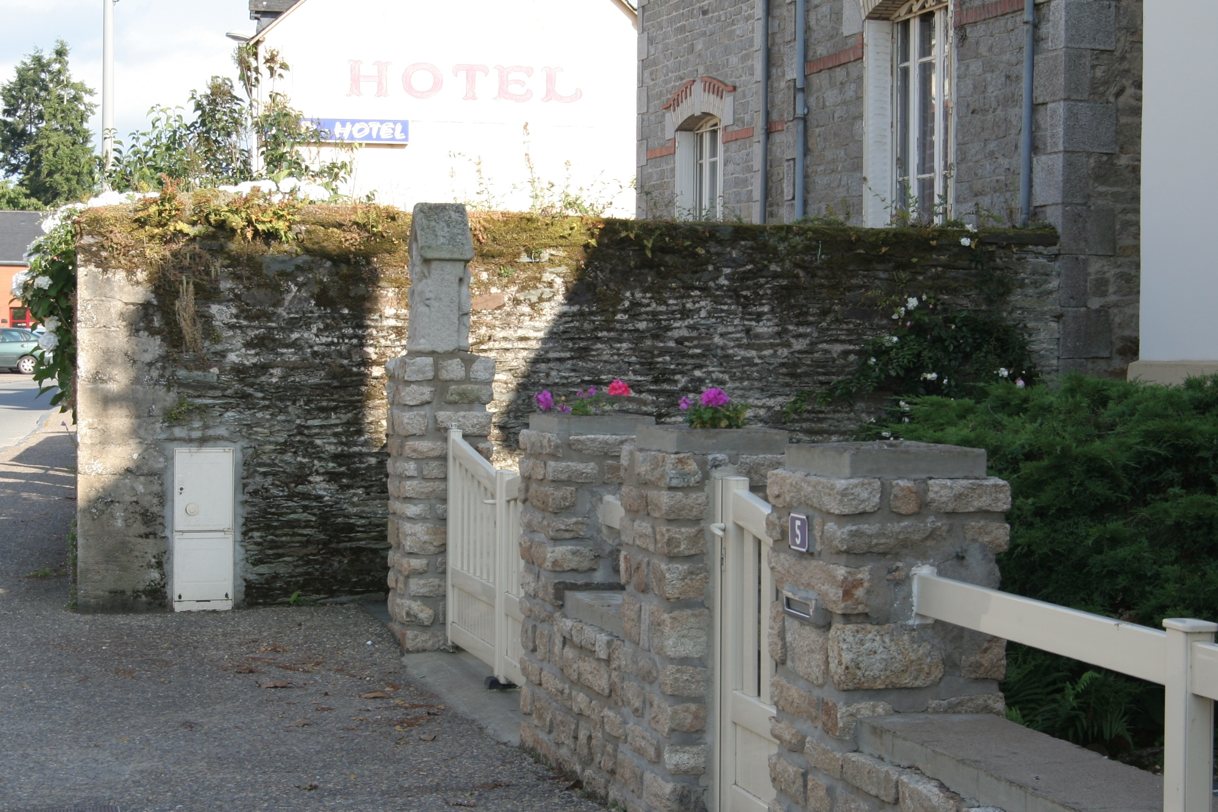 Croix du faubourg Saint-Michel à Malestroit : vue du mur de clôture dans lequel elle est insérée.